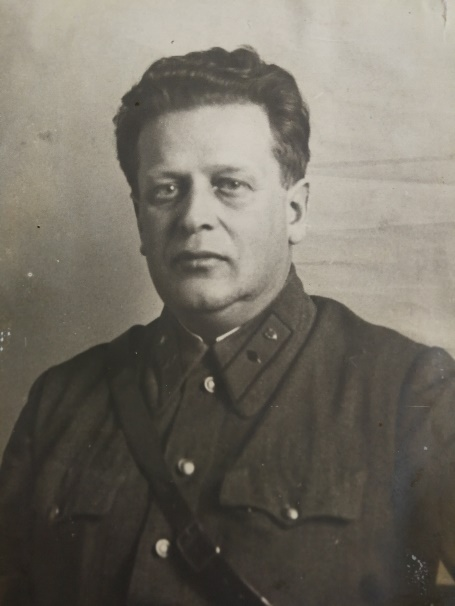 Присвоено звание диввоенюриста